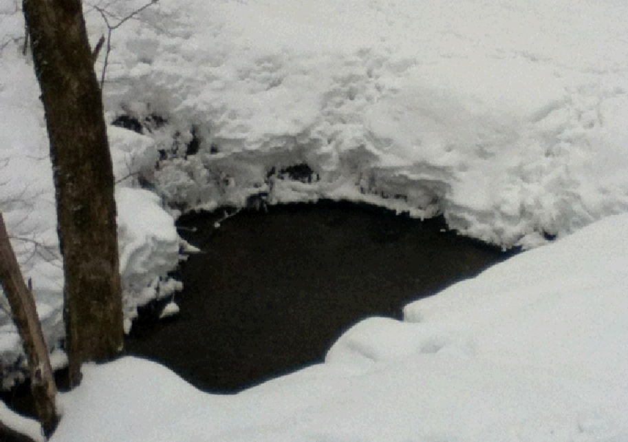 内別川源頭部、南西向き